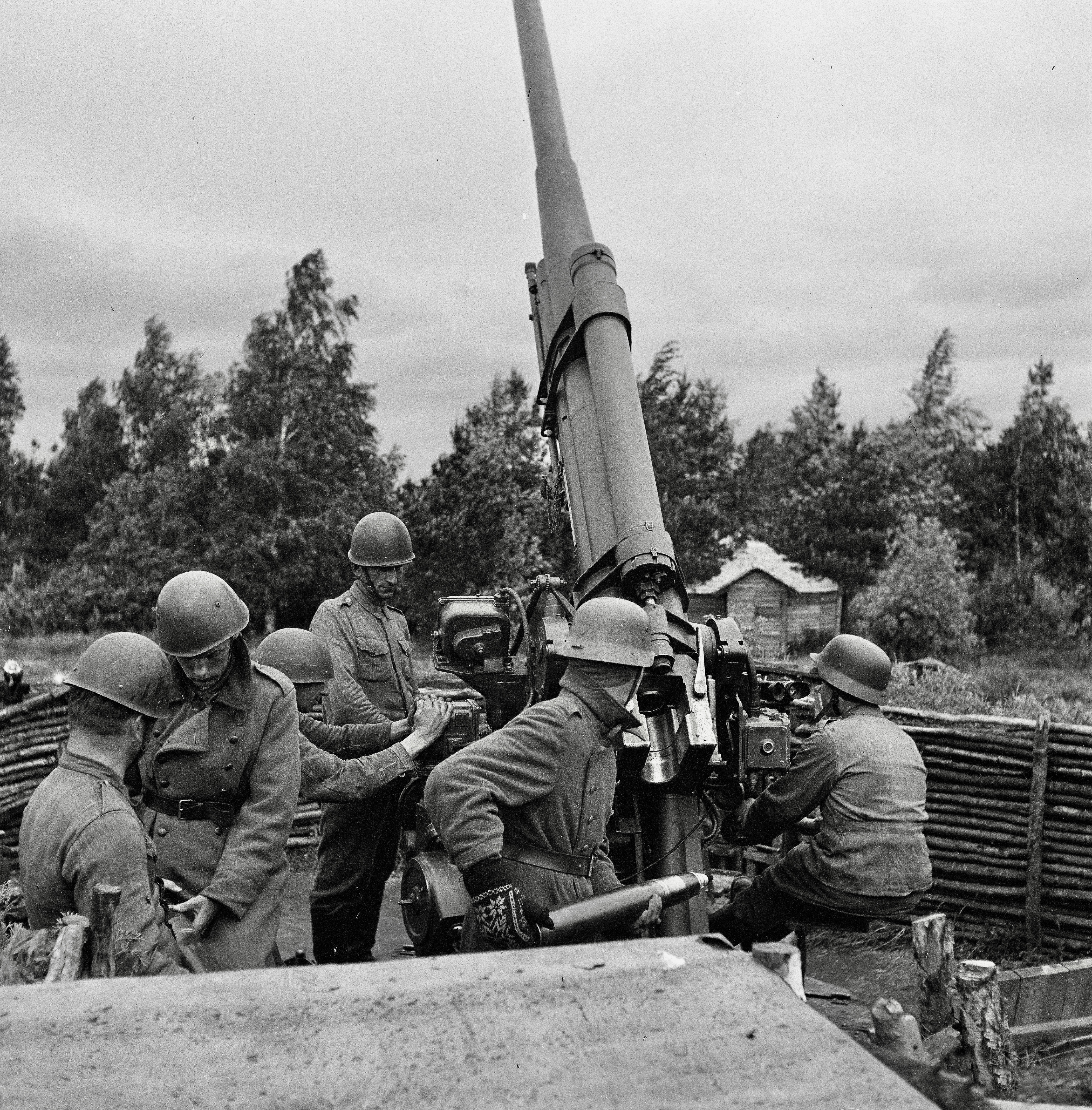 Финская зенитная батарея в районе Выборга, июнь 1944 г.